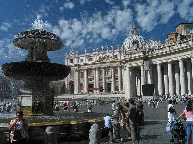 Beschreibung: Brunnen auf Petersplatz, Rom Quelle: Eigenes Foto 9/2004 Fotograf oder Zeichner: Rolf Süßbrich Andere Versionen